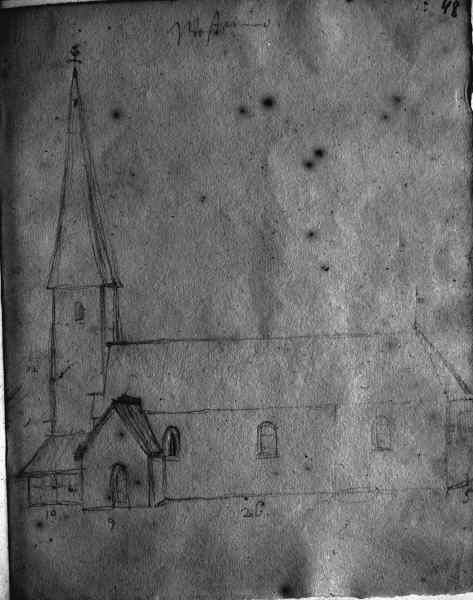 Västermo kyrka mot söder, teckning av Johan Peringskiöld från 1686.